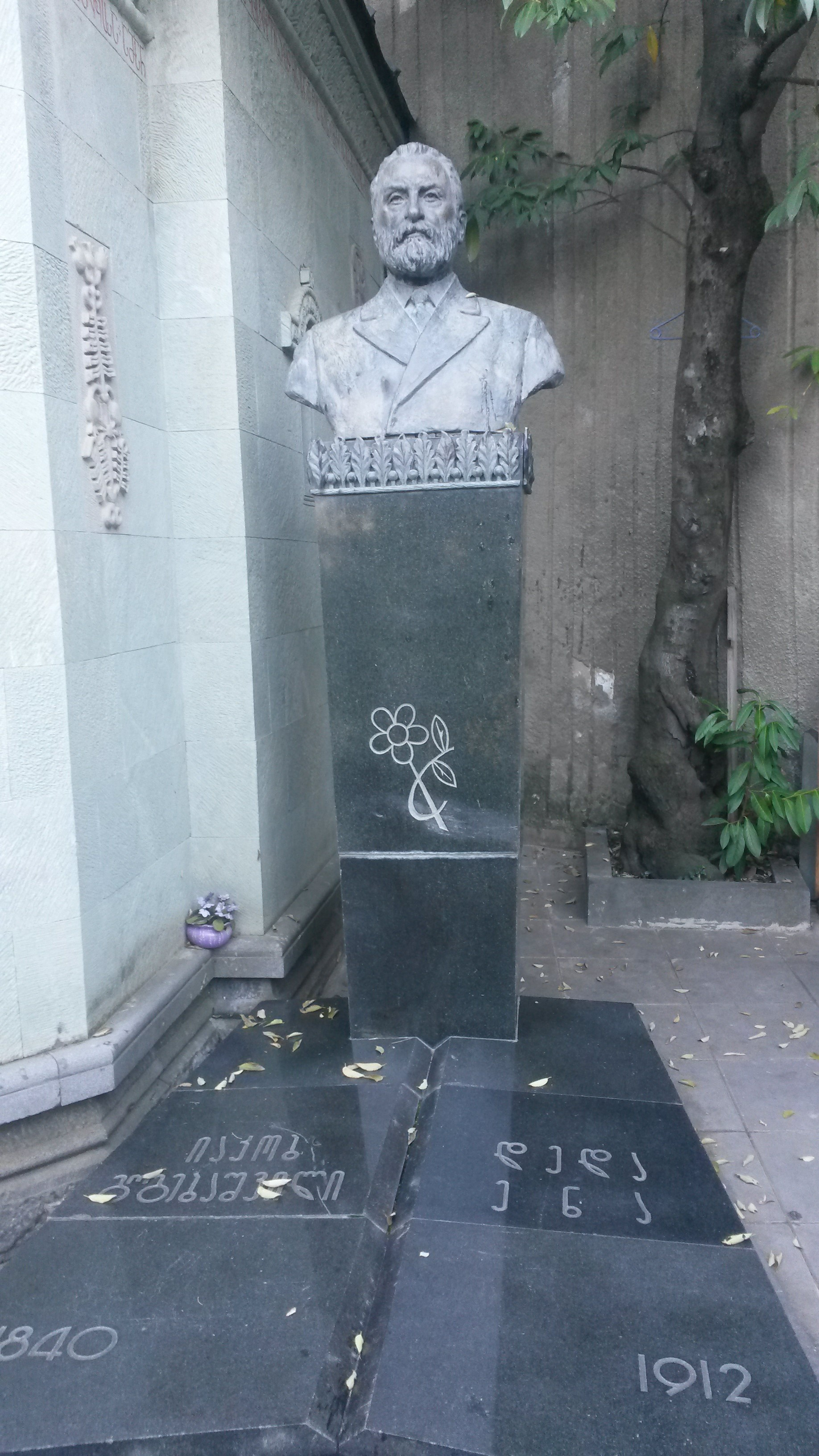 მთაწმინდის პანთეონი